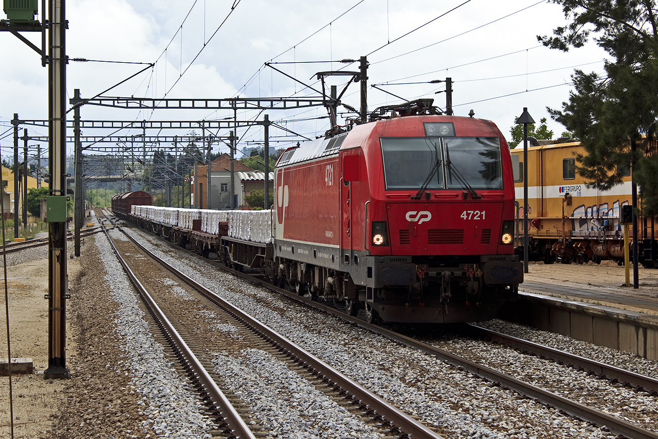 Um martelo-surpresa (well almost) liderado pela 4721 passa em Mogofores. Embora esta fotografia tenha sido tirada com a minha máquina o crédito vai todo para o Erickson Júnior, pois foi ele que a tirou!